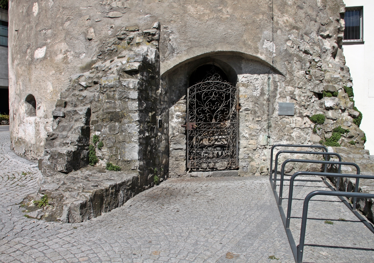 Feldkirch (Vorarlberg): Blick auf den Zugang zum Katzenturm.